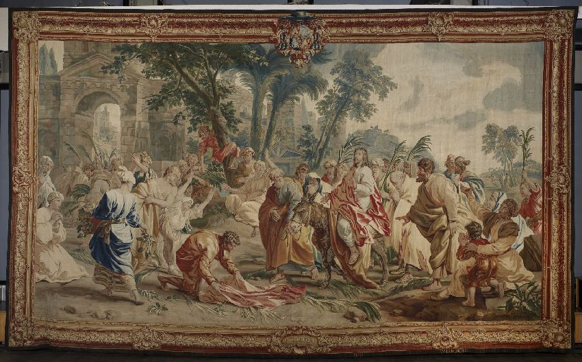 18e-eeuws wandtapijt in het koor van de Sint-Salvatorkathedraal te Brugge. Het tapijt is onderdeel van een serie van zeven met als thema Het leven van Jezus, en werd in 1731 door de Brugse bisschop Hendrik Jozef van Susteren besteld bij de Brusselse tapijtmanufactuur van Jasper van der Borght. Het ontwerp is van Jan van Orley.